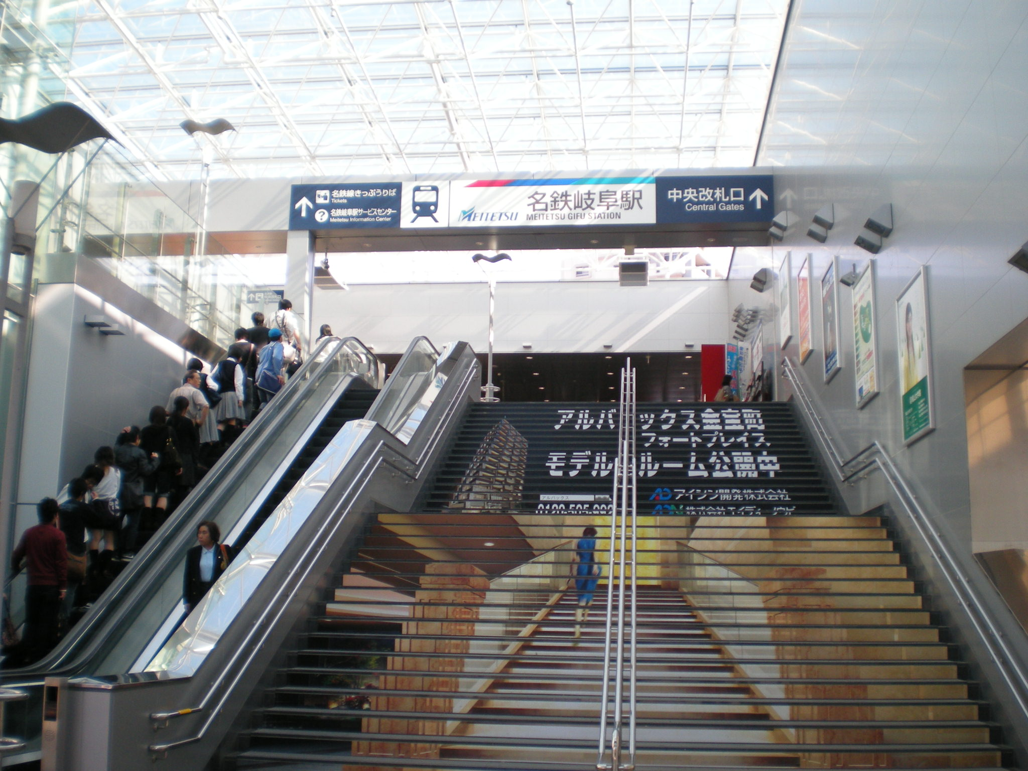 名鉄岐阜駅(Meitetsu Gifu Station)